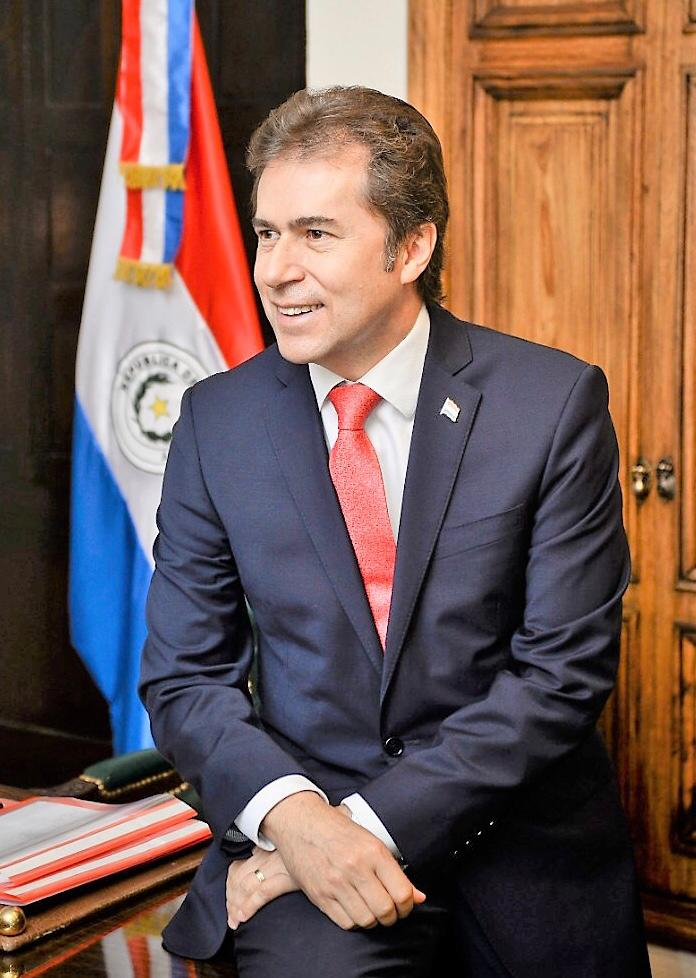 Despacho